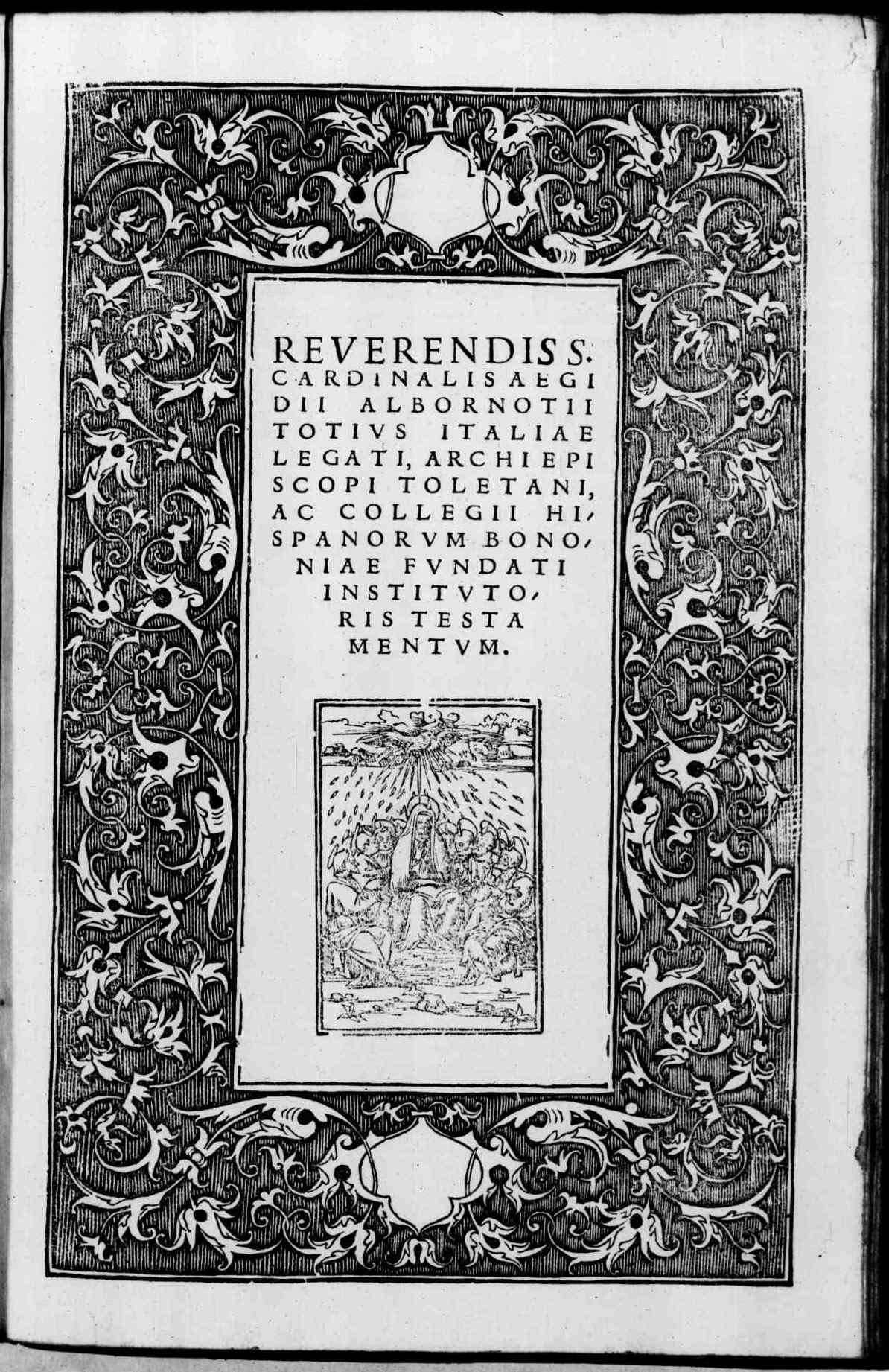 Frontespizio